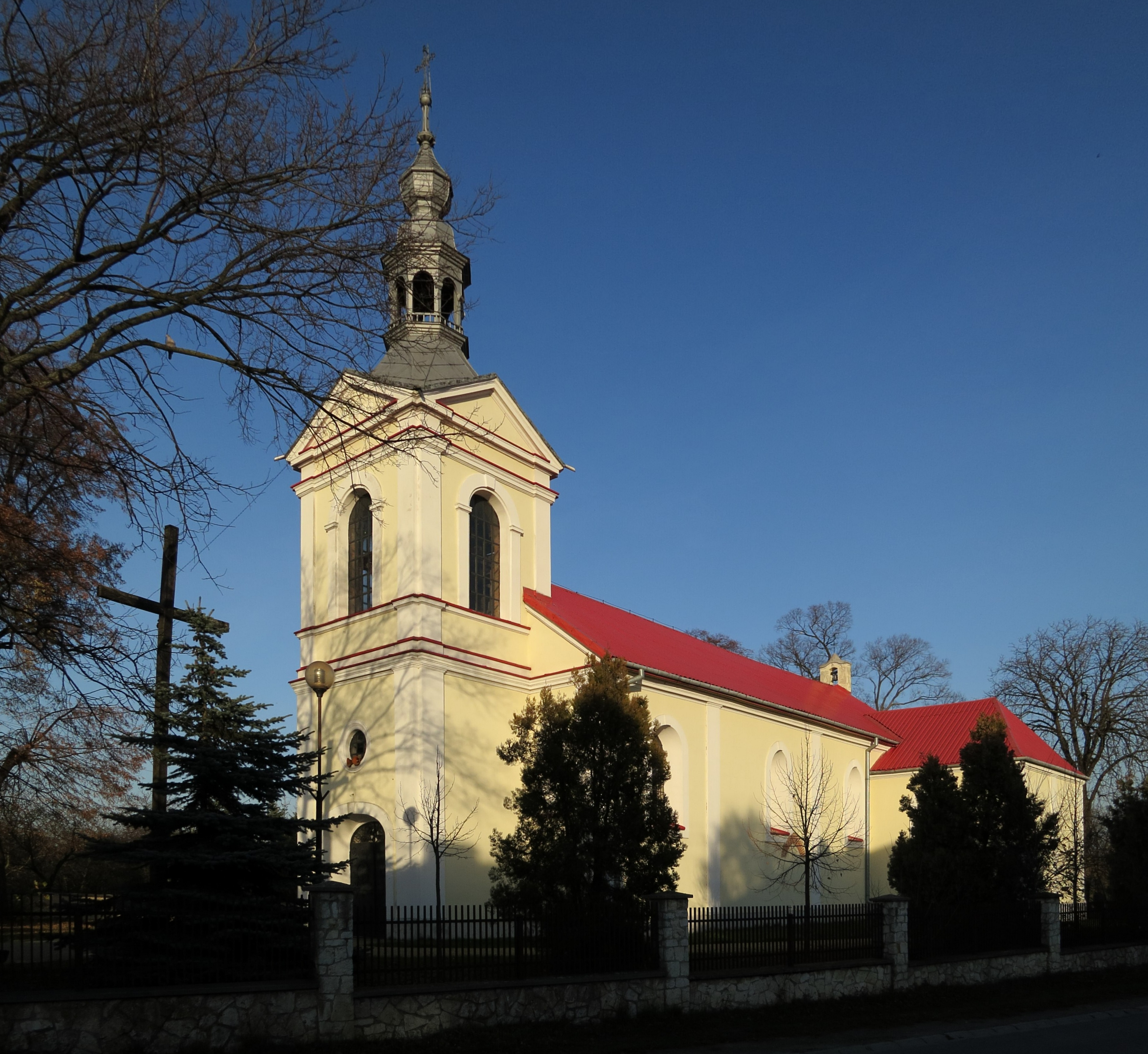 Żuraw 38, kościół parafialny pw. św. Bartłomieja, 1 poł. XV, 1885-1893, 1932